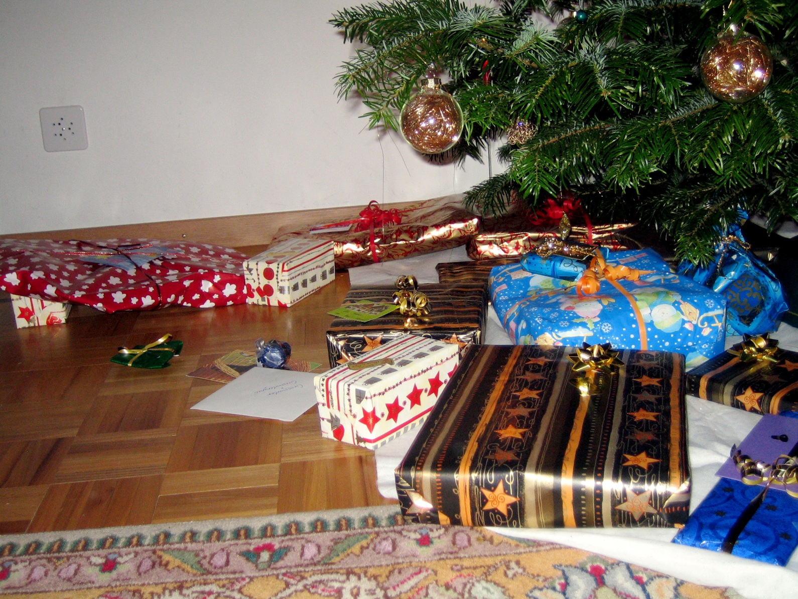 Weihnachtsgeschenke unter einem Weihnachtsbaum